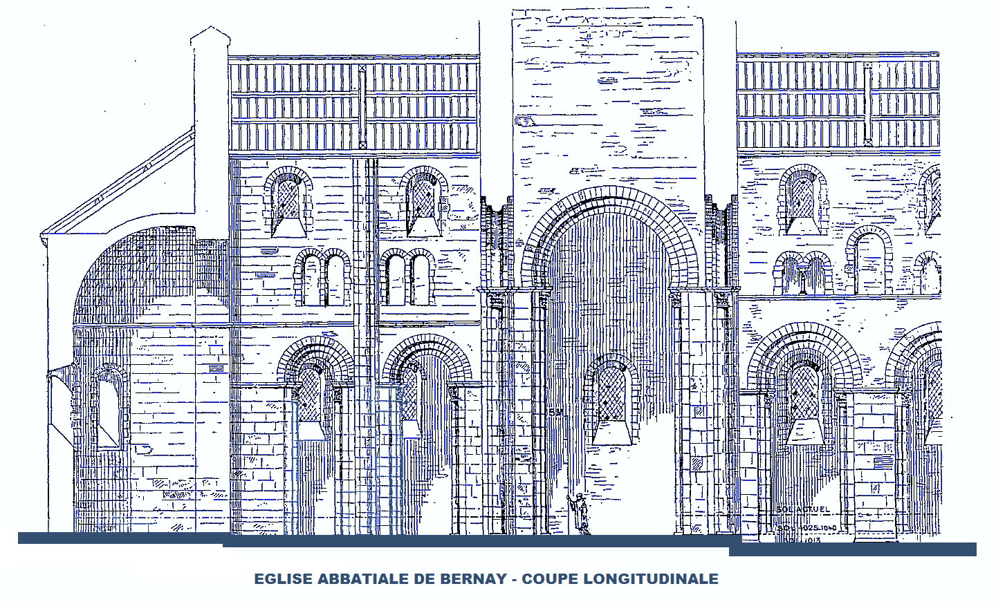 Abbaye de Bernay, Coupe longitudinale sur l'église (image du domaine public modifiée, Congrès archéologique de Caen, 1909)